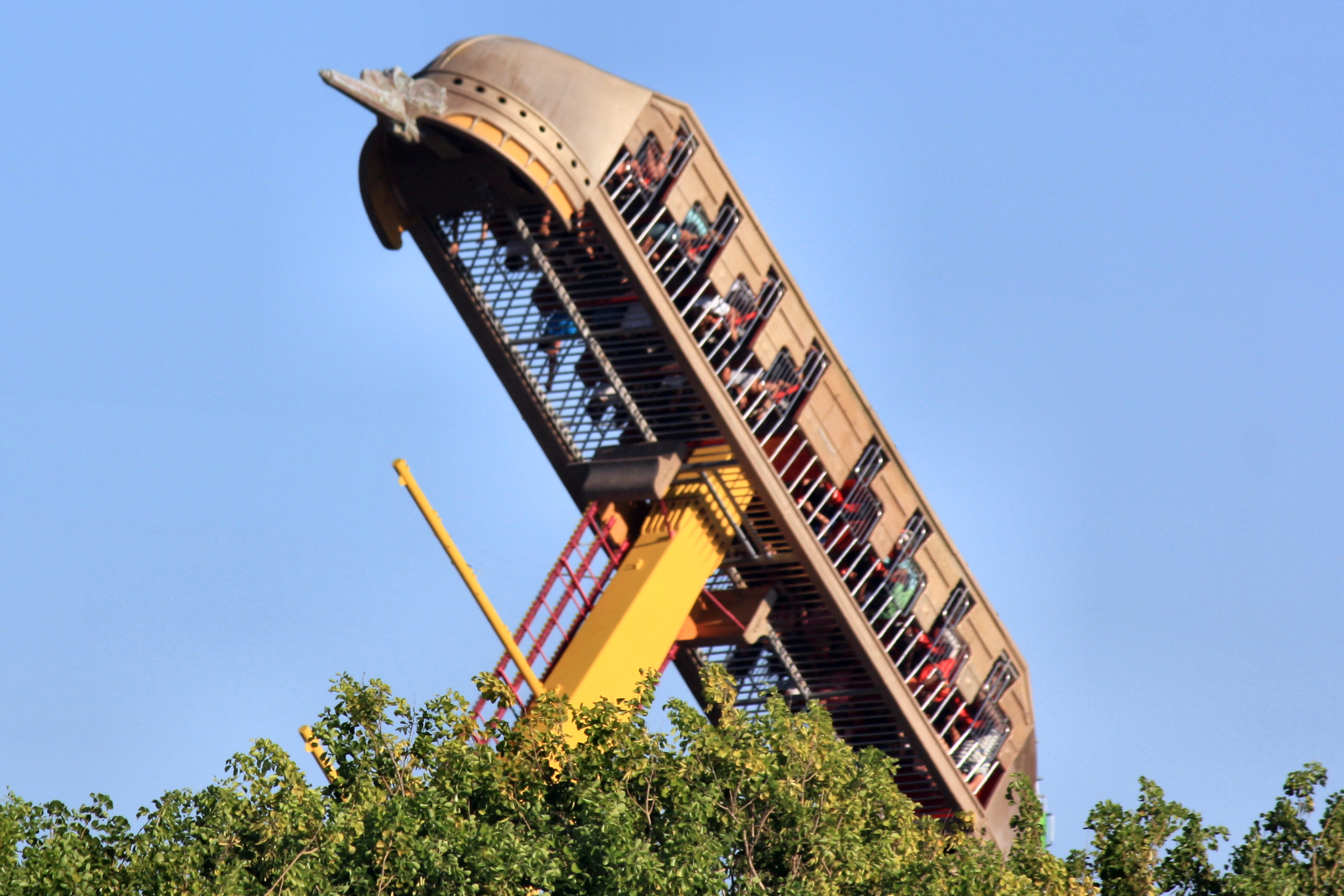 ספינת הפיראטים שבפארק השעשועים סופרלנד, ראשון לציון.